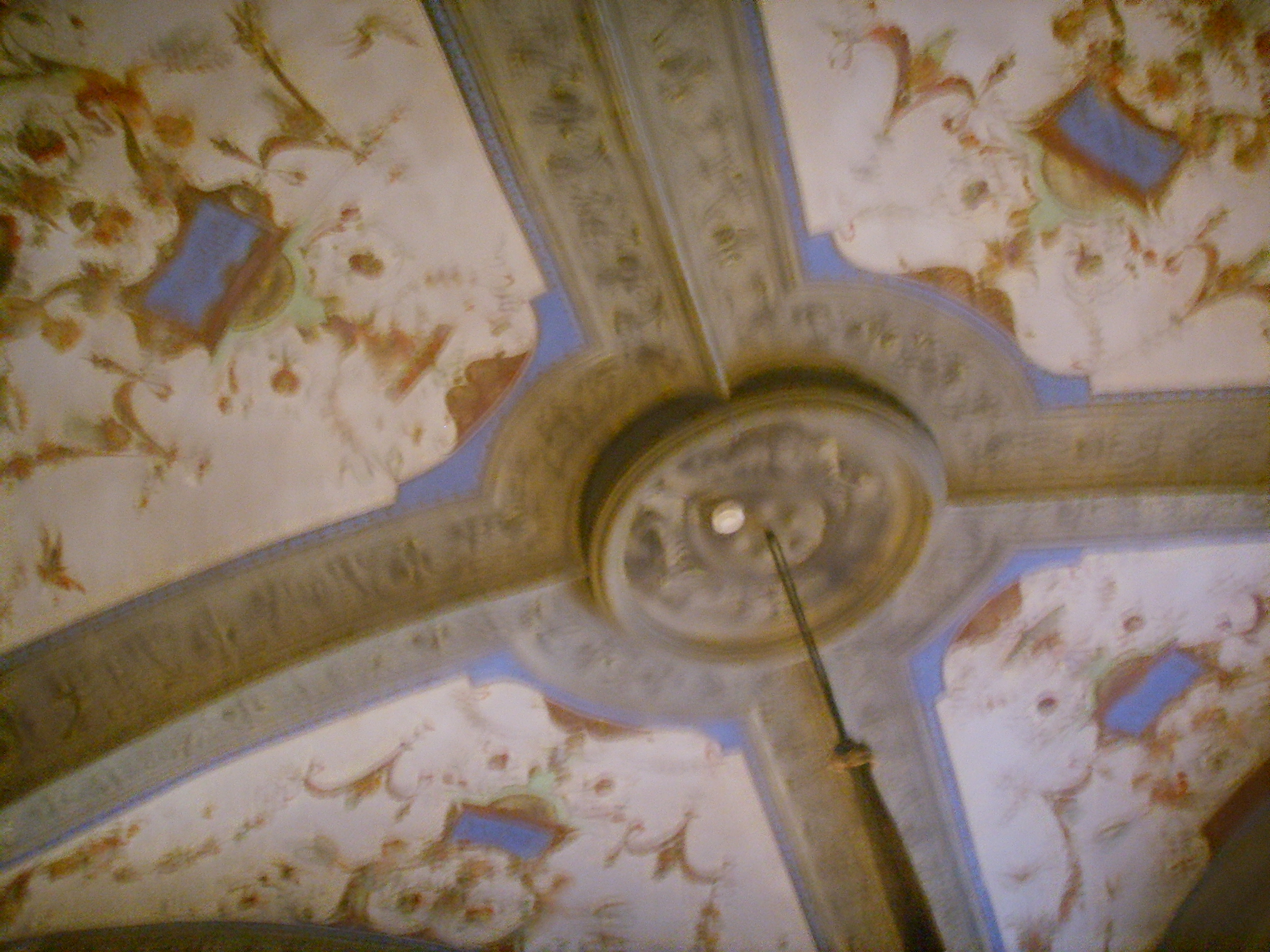 Villa medicea di Poggio a Caiano, inside Bianca Cappello Apartments in Poggio a Caiano, Italy